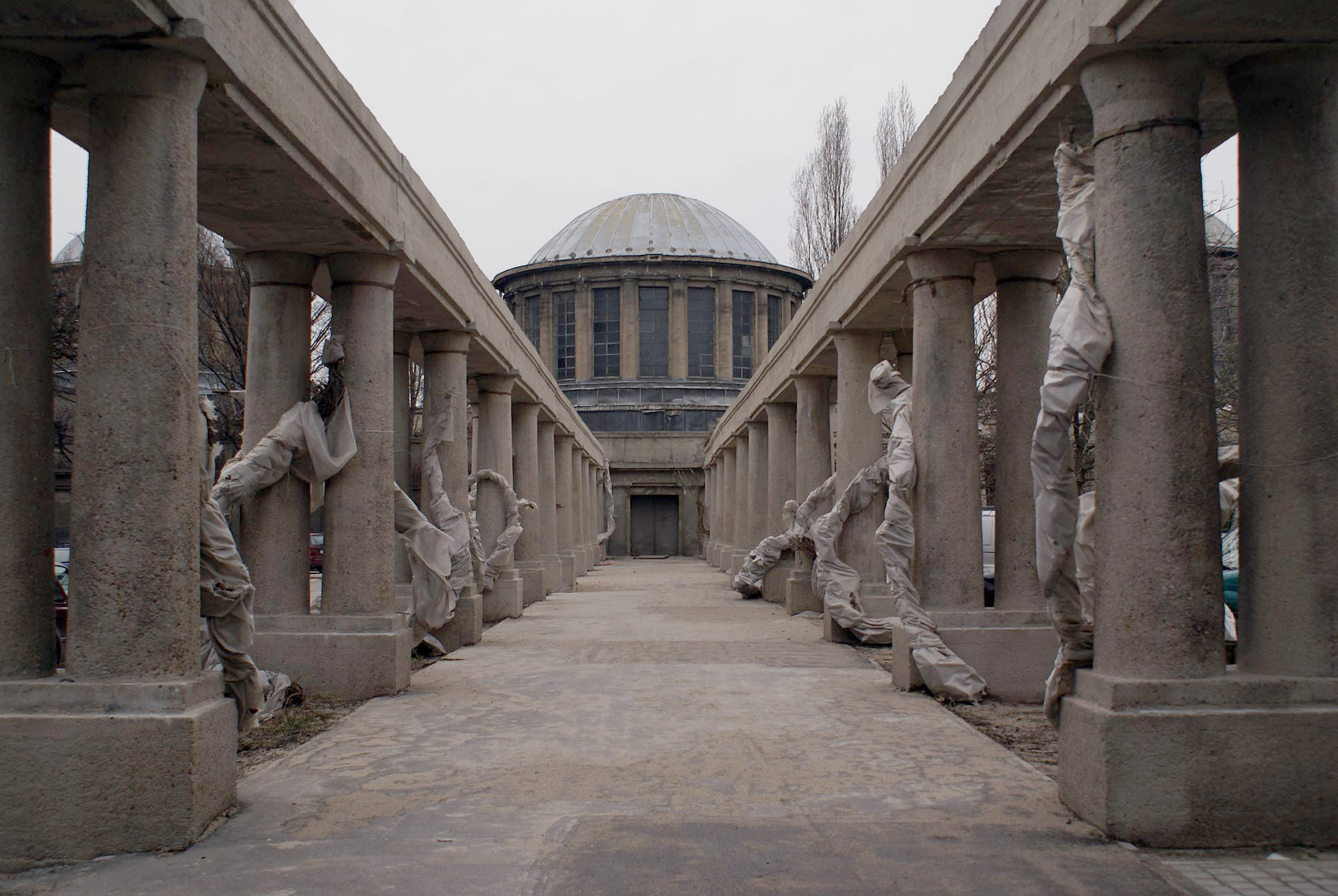 Wrocław, Pawilon Czterech Kopuł